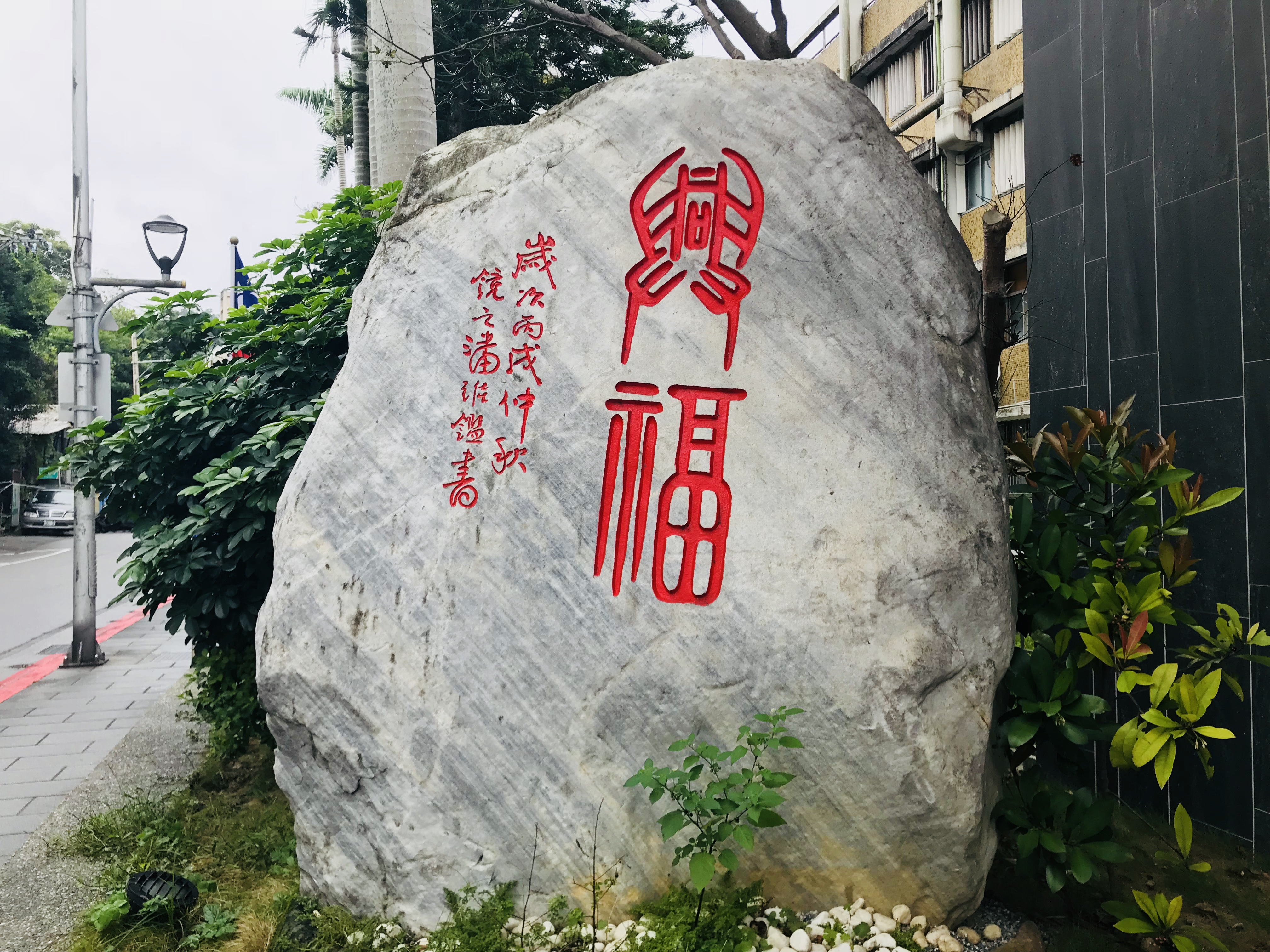 臺北市立興福國民中學門口的石碑，上書有興福二字